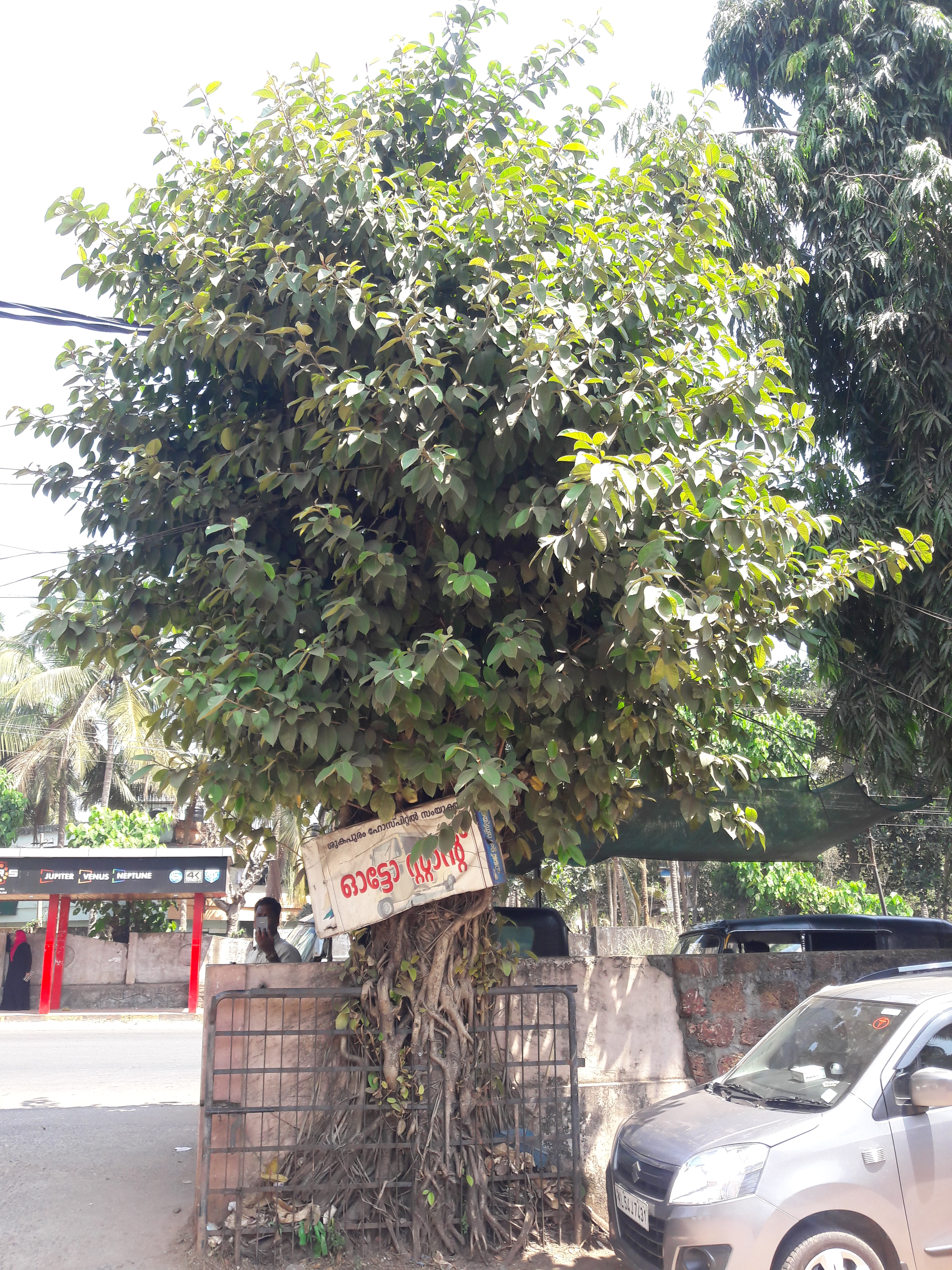 മലപ്പുറം ജില്ലയിലെ എടപ്പാള്‍ എന്ന സ്ഥലത്ത് ഒരു സ്വകാര്യ ആശുപത്രിയുടെ മതിലിന് മേലെ വളരുന്ന ഒരു കല്ലാല്‍ Brown-woolly fig / Mysore fig ശാസ്ത്രീയ നാമം Ficus drupacea കുടുംബം Moraceae.